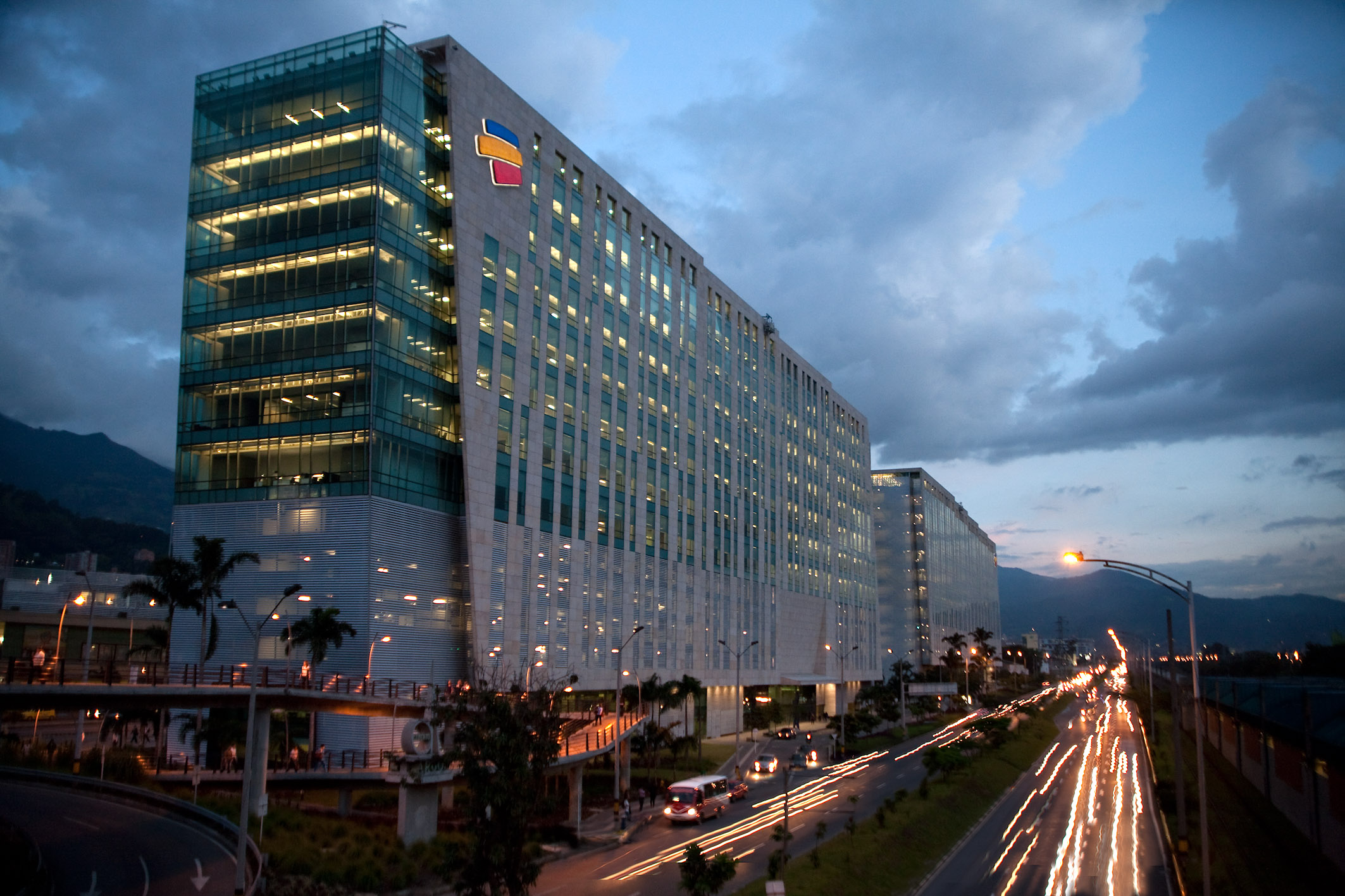 Vista del Edificio Bancolombia desde la Estación Industriales, Medellín.